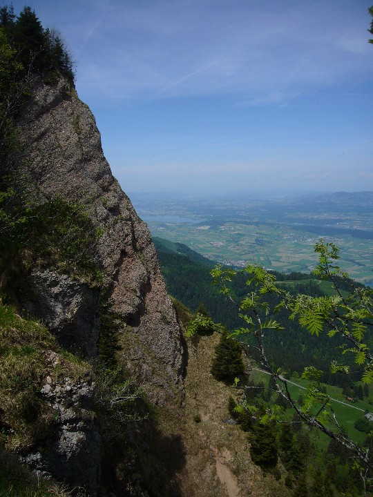 Nagelfluhwand am Planggenstock mit Blick auf die Linthebene und den Zürichsee